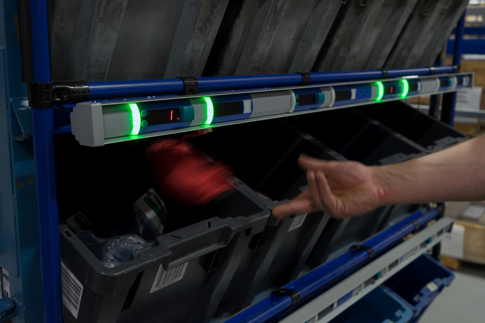 Die Leuchtringe zeigen das Fach an, in das der Artikel eingeworfen werden soll. So erfolgt eine schnelle Artikelverteilung auf die Zielfächer.